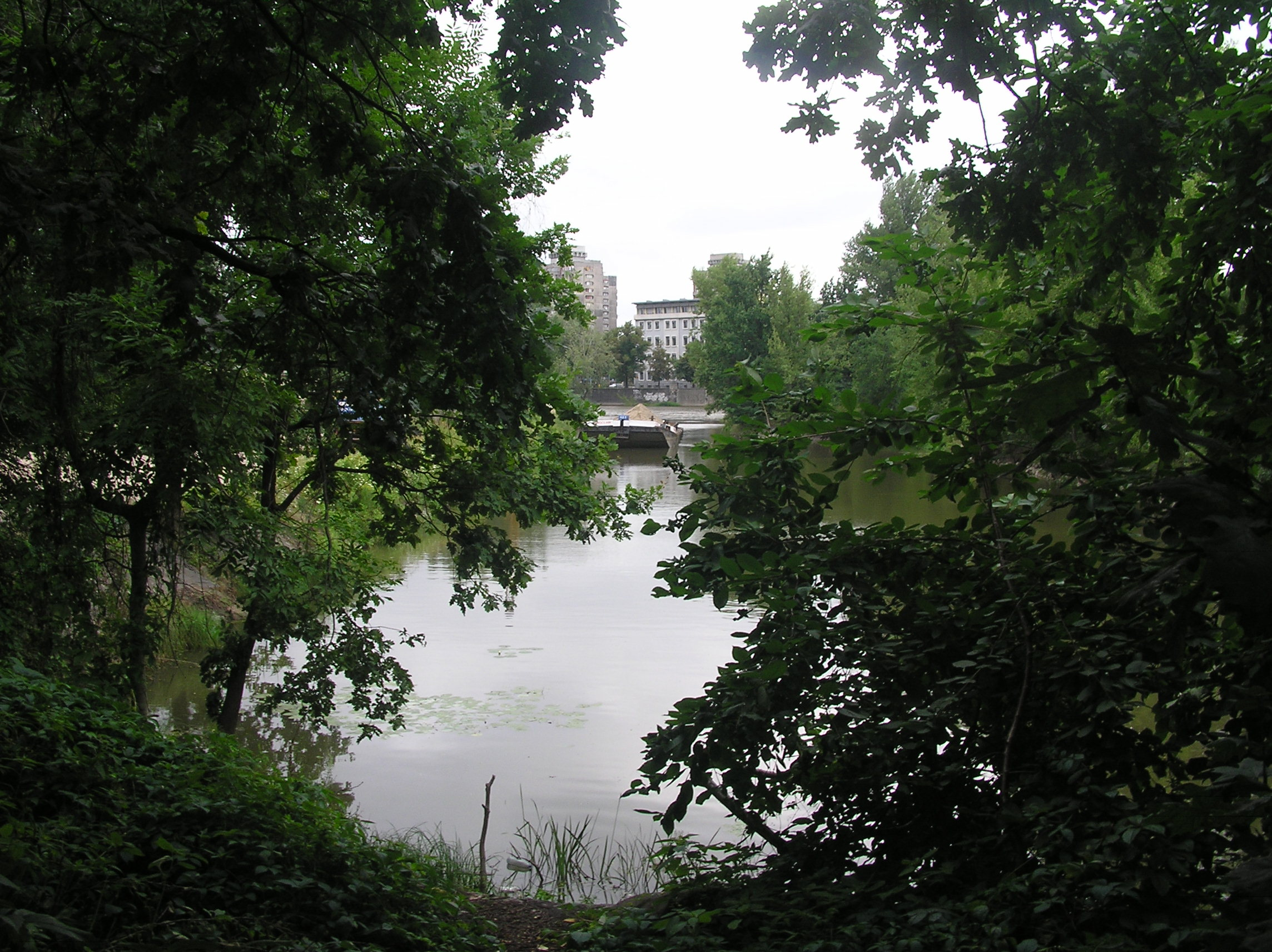 Wrocław, Port Ujście Oławy